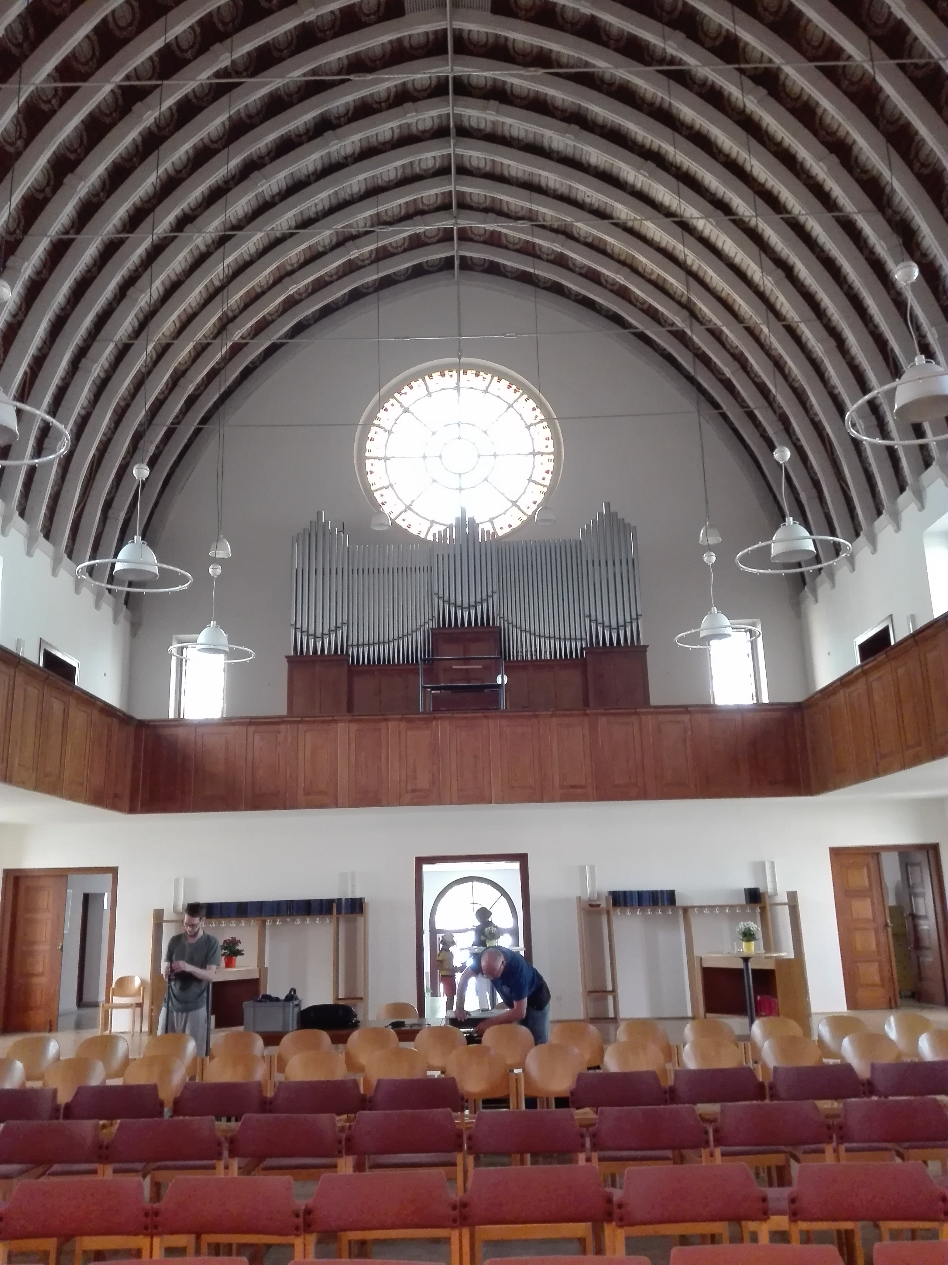 Innenansichten der Erlöserkirche in Wuppertal​-Wichlinghausen